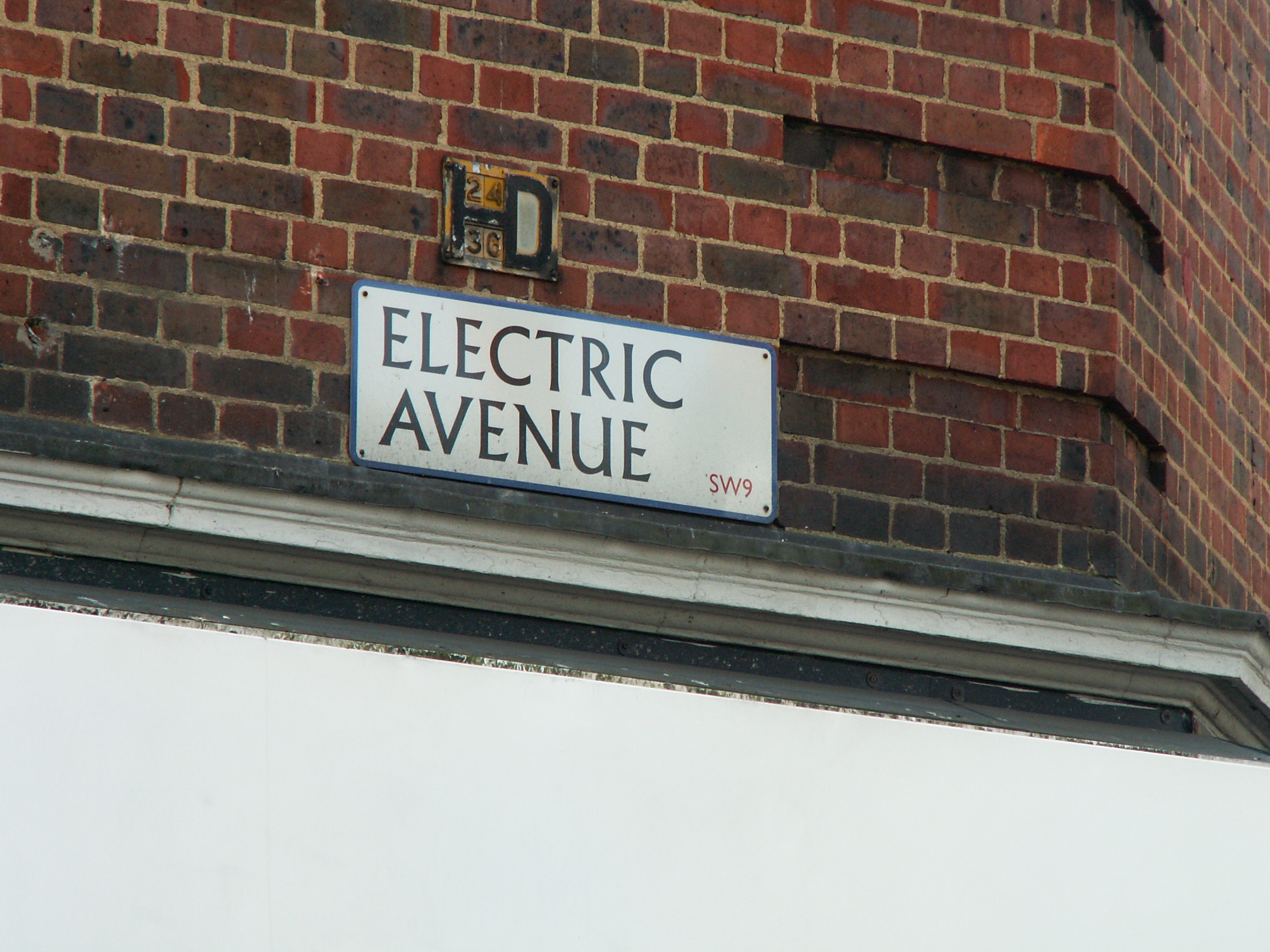 Electric Avenue, Brixton, London